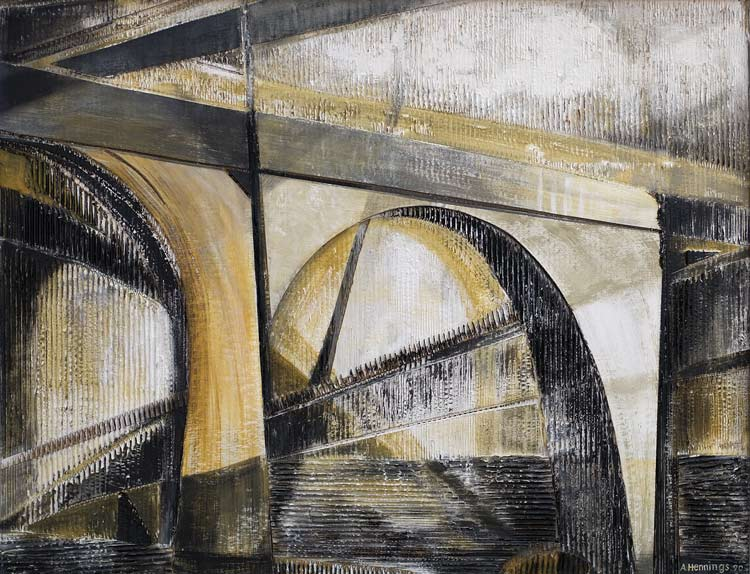 Titel: Über Brücken, Wellpappenreliefschnitt